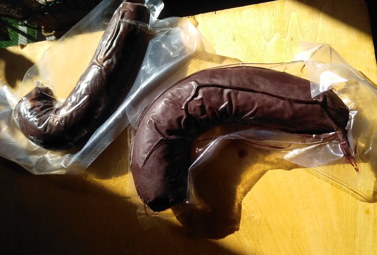 Mustardela (un salume tradizionale della Val Pellice) confezionata sottovuoto